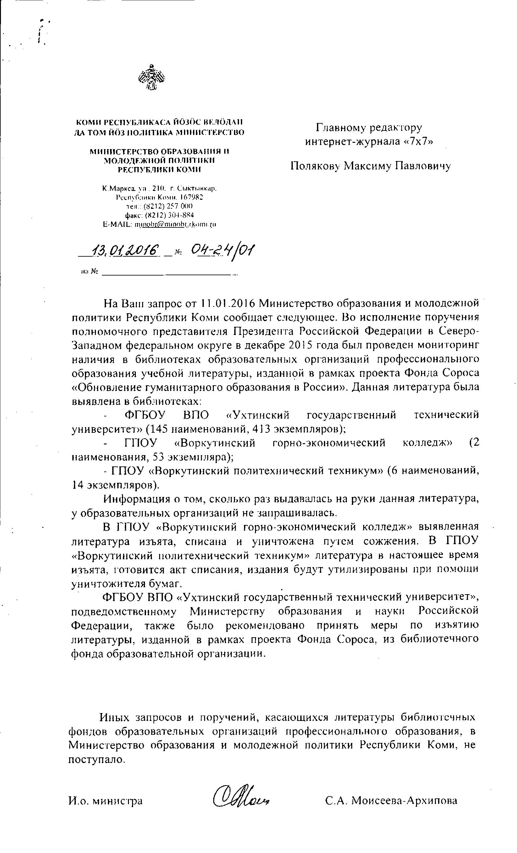 Ответ и.о. министра образования и молодёжной политики Республики Коми на запрос журнала 7x7 об изъятии и сожжении книг, изданных при поддержке Фонда Сороса . См. также File:Поручение_об_изятии_книг_20.11.2015.jpg